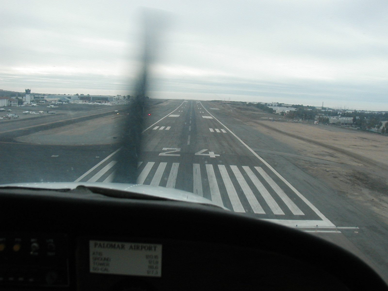 Final RWY24 Palomar